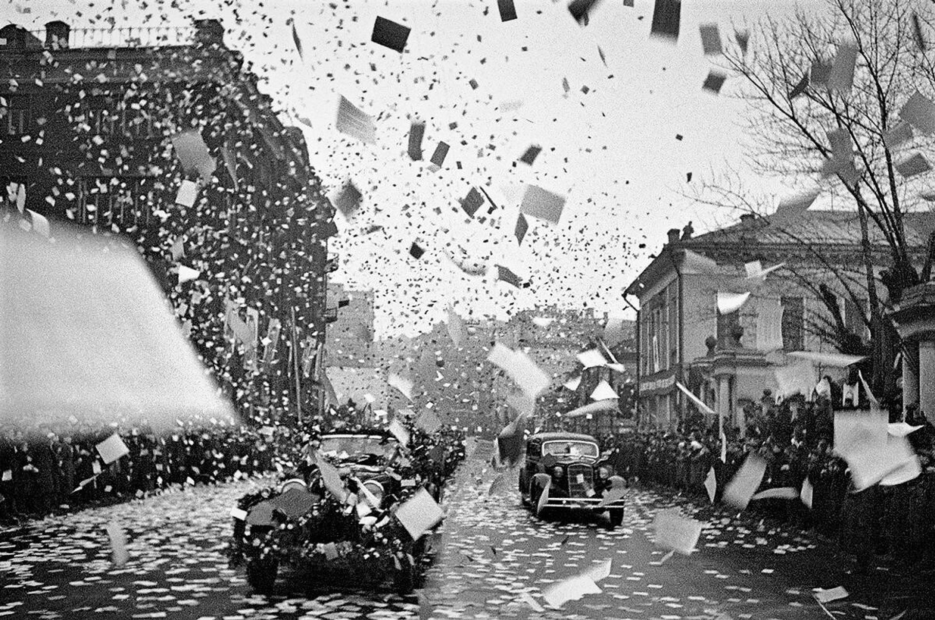 Встреча участников экспедиции Северный полюс-1 в Москве